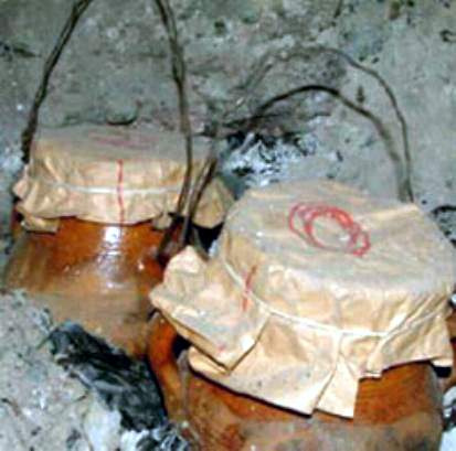 Tangia Marrakchia (de Marrakech)